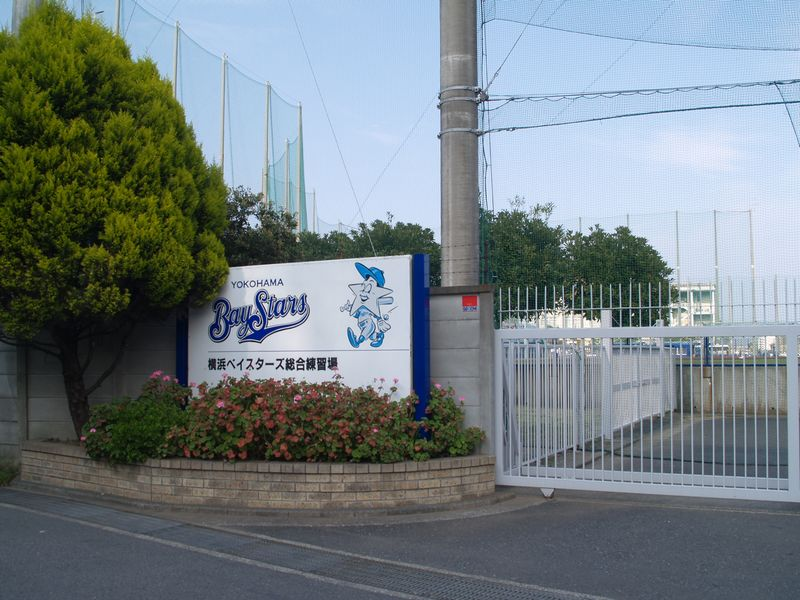 ベイスターズ球場裏口